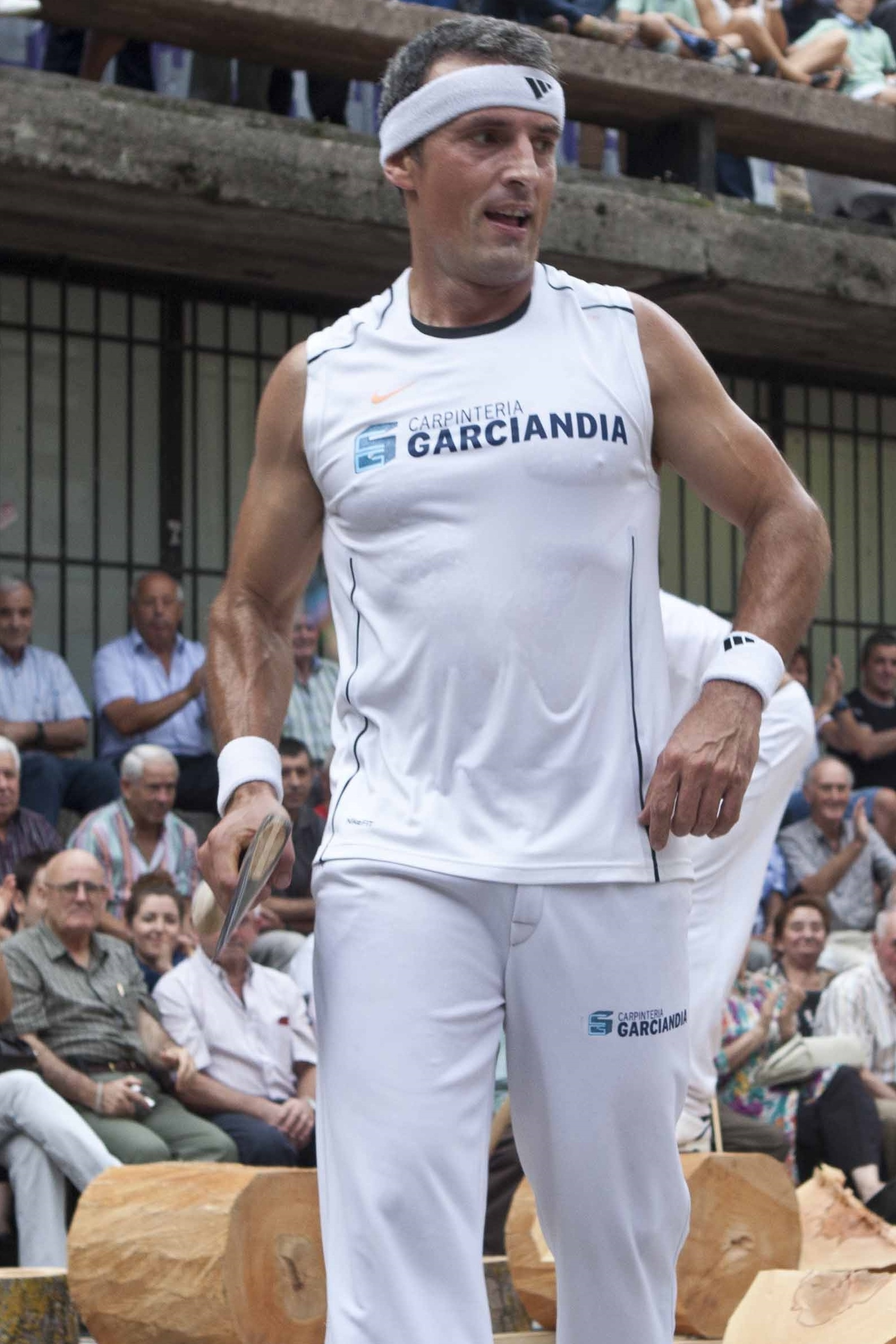 Floren Nazabal aizkolaria 2012ko Urrezko Kopan. 2012ko abuztuak 15.